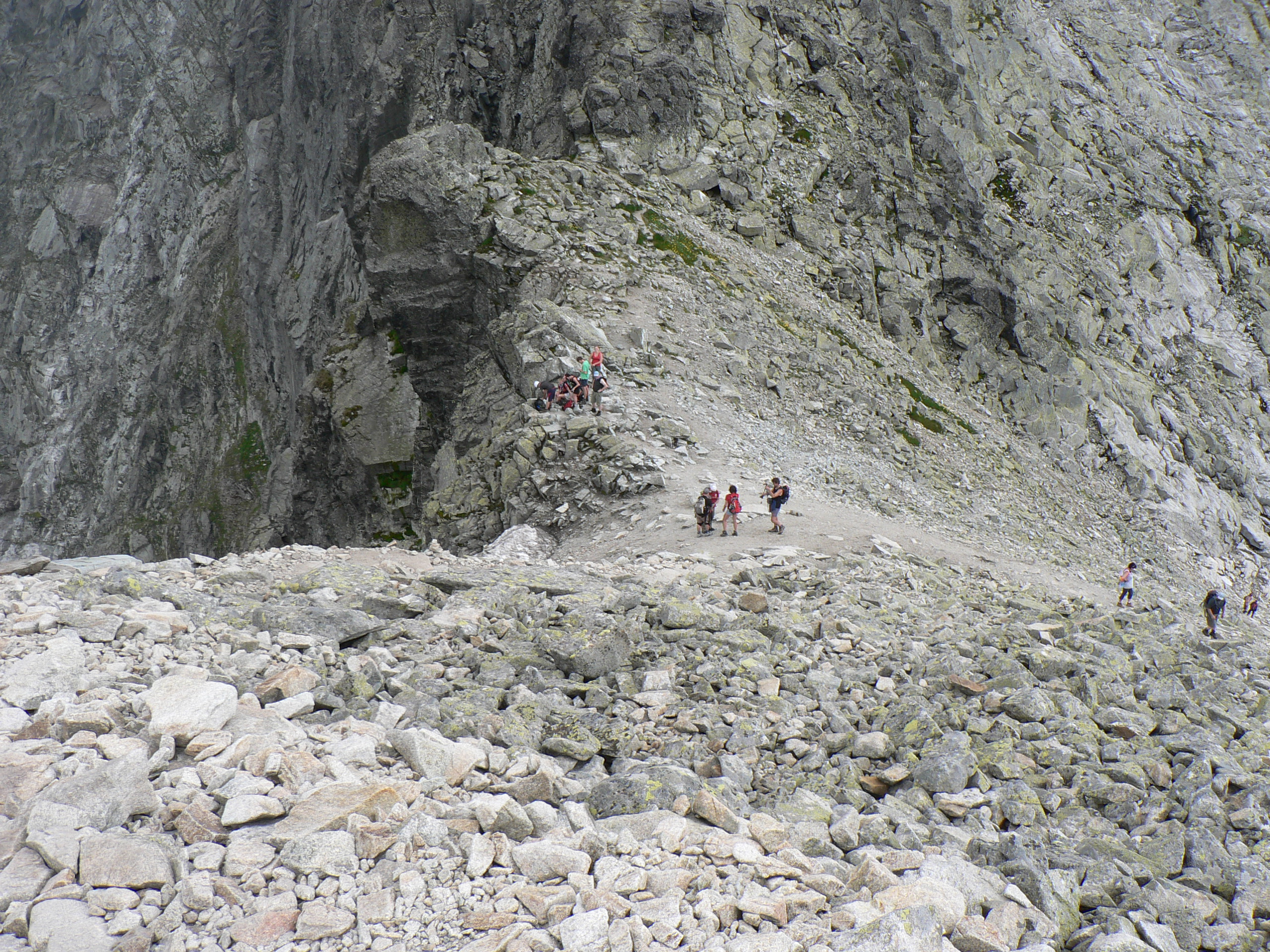 Przełęcz Waga pod Rysami